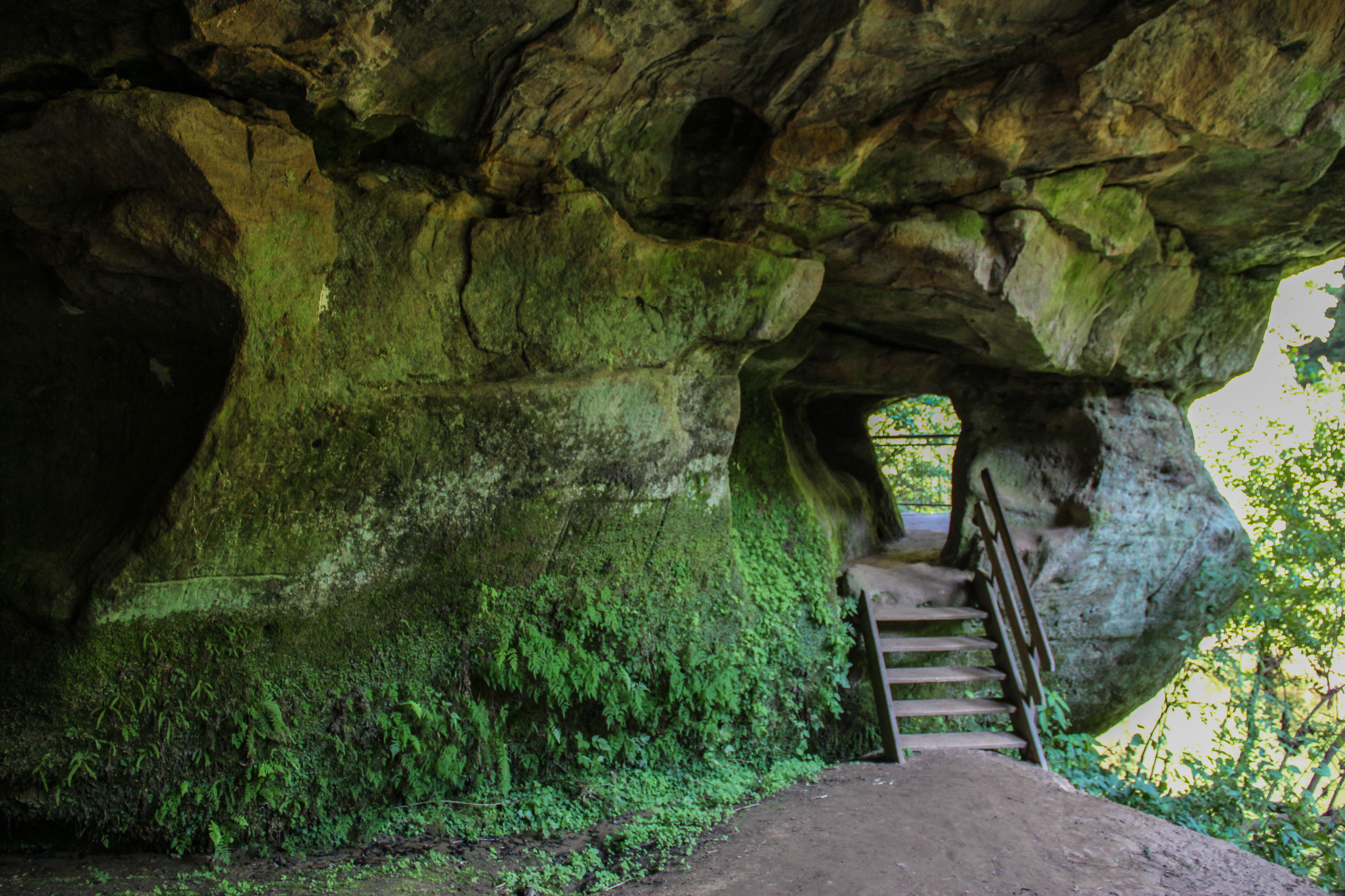 Schwarzachschlucht bei Schwarzenbruck